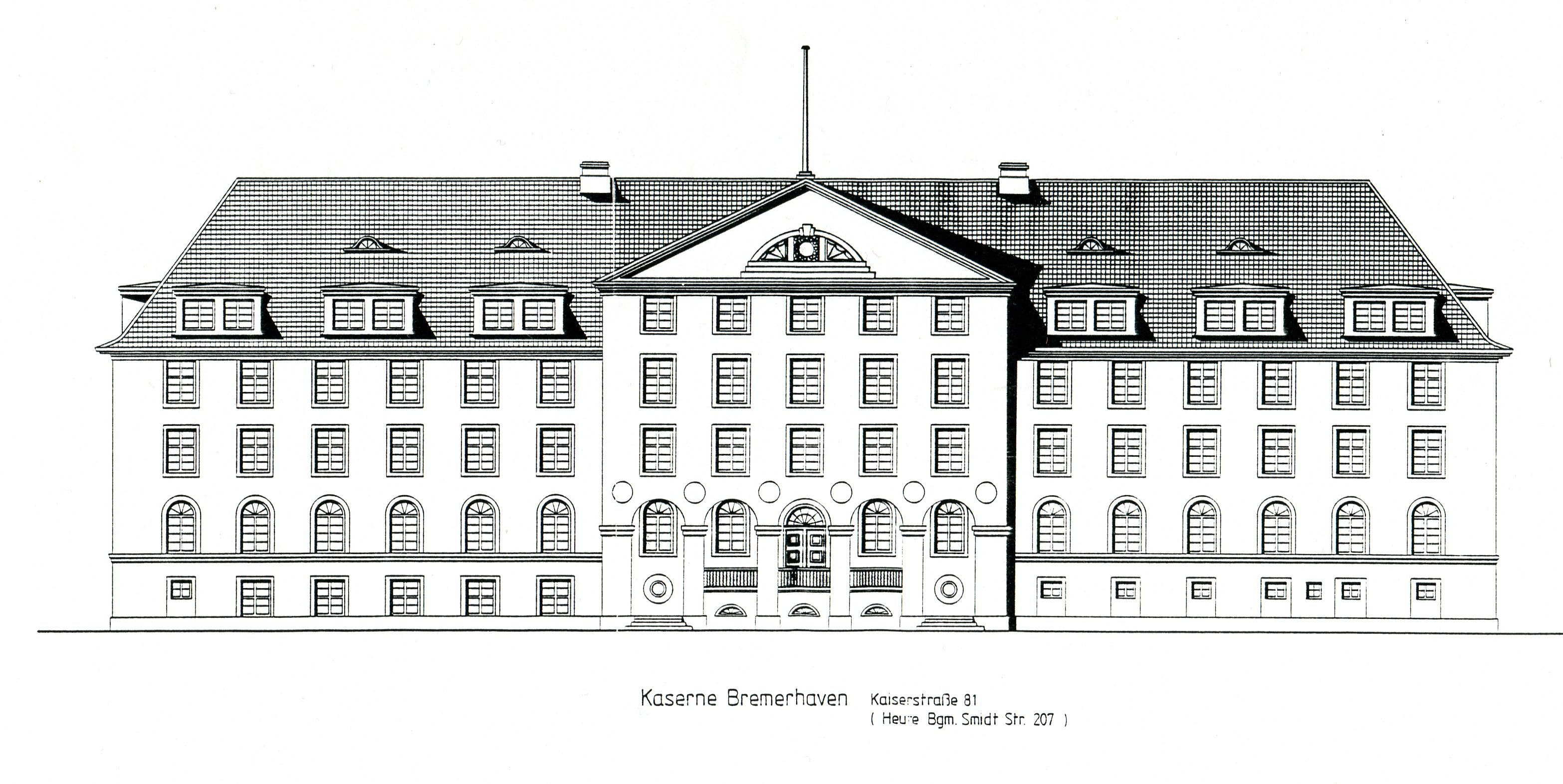 Bauzeichnung der Kaserne Roter Sand, Bremerhaven-Lehe